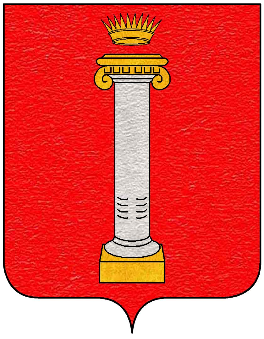 Stemma della famiglia Colonna